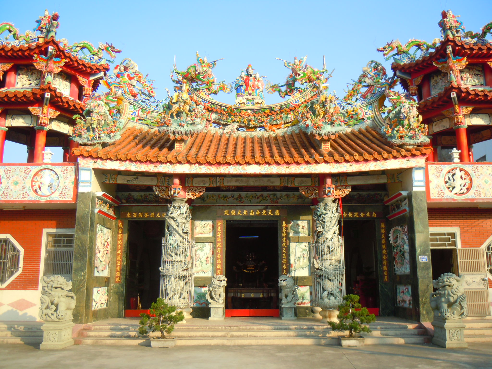 中文（台灣）: 彰化縣和美鎮嘉犁里東坡路17巷臨10號－嘉犁嘉安宮。